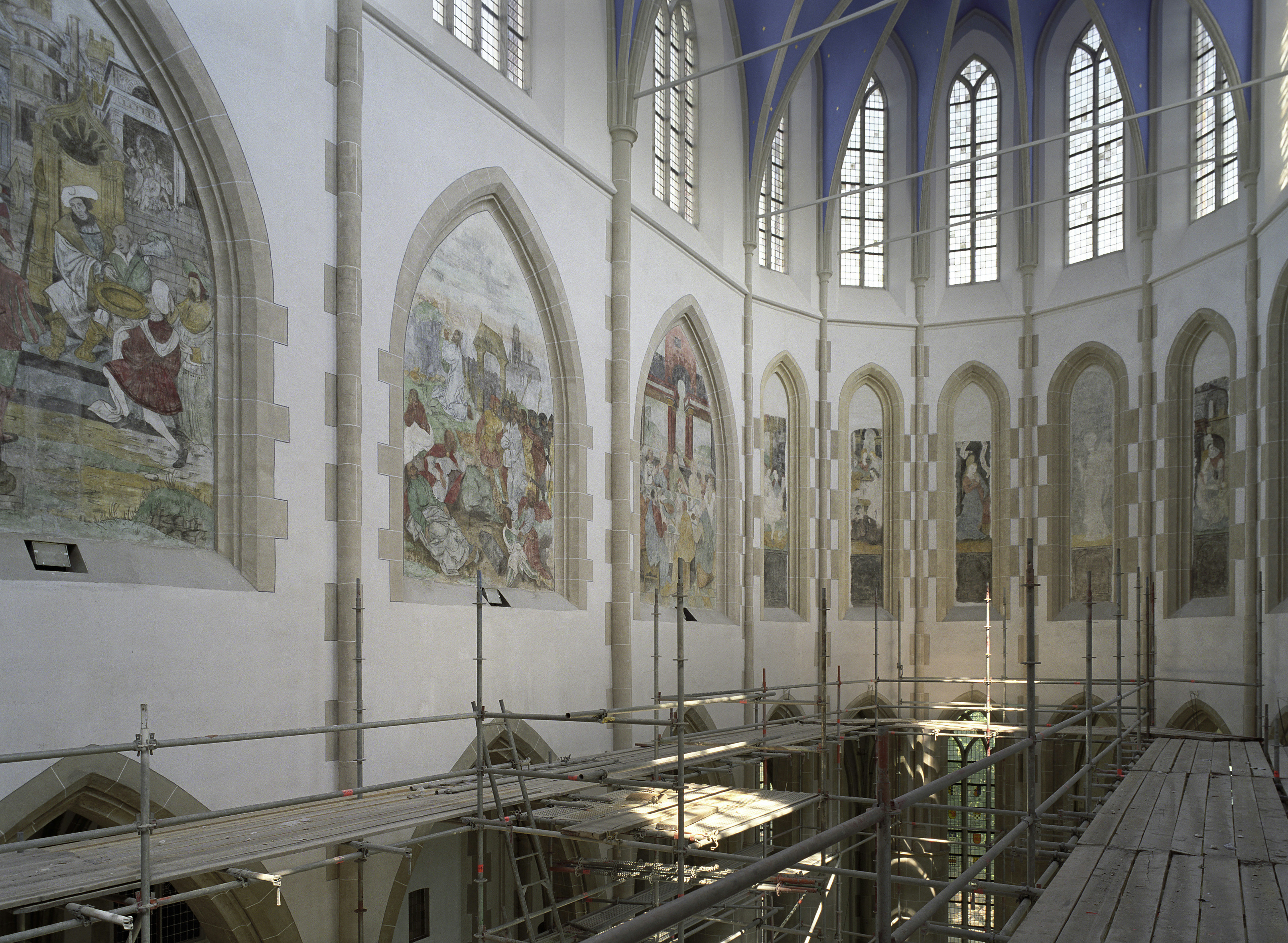 Martinikerk: Interieur, overzicht schip met nisschilderingen richting koor